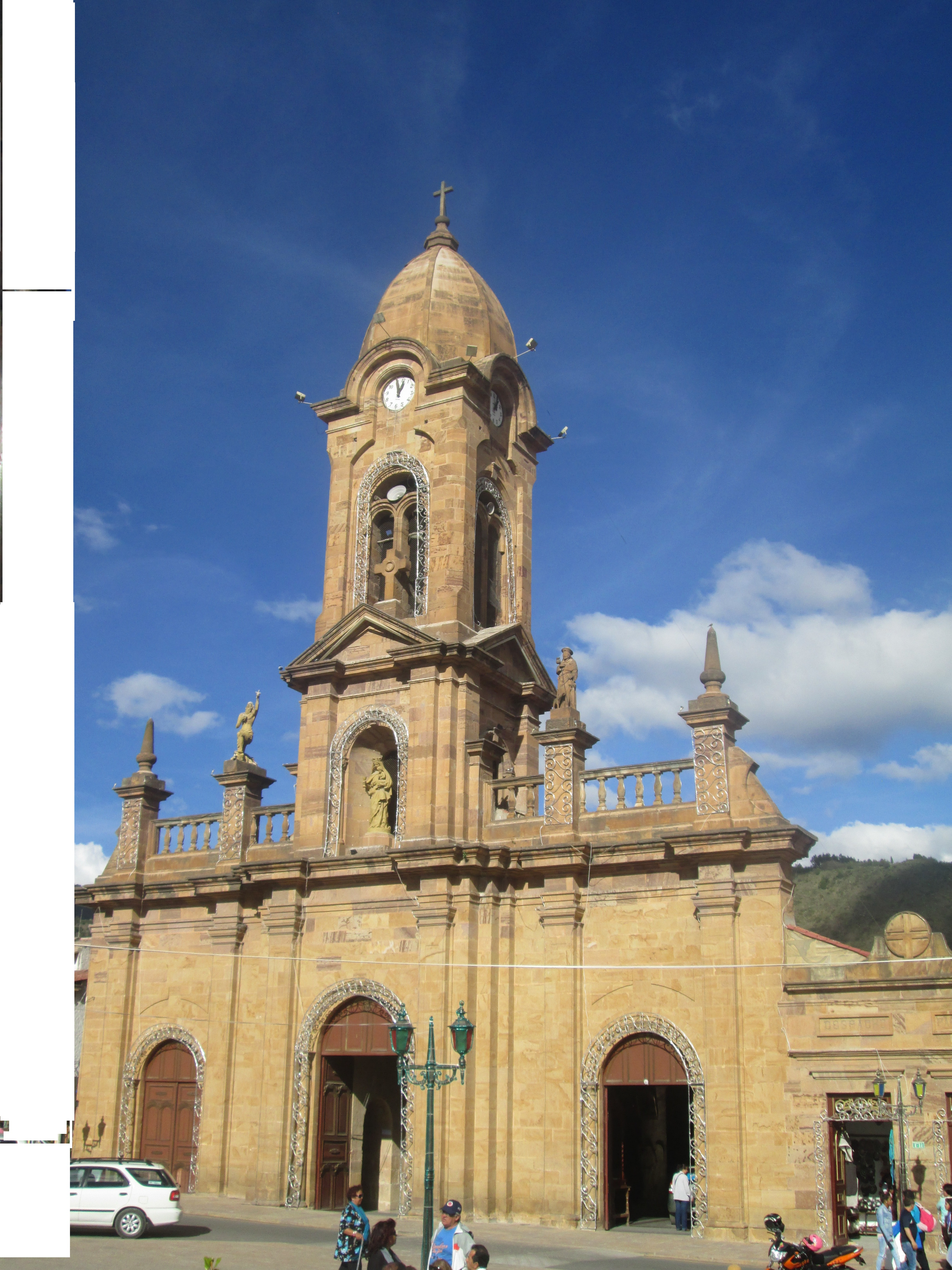 Nobsa es un municipio turístico boyacense que se caracteriza por su tradición artesanal, cultural y los viñedos. Su ubicación hace muy fácil visitarlo, la cercanía con Bogotá y Tunja, las buenas carreteras y la seguridad vial, nos permiten realizar un viaje muy tranquilo y placentero, admirando el paisaje , realizando una que otra parada para comprar frutas y mecato de la región. En Nobsa encontramos atractivos culturales y naturales, destacamos algunos que pueden ser de su interés: El Museo Siderúrgico, podemos conocer como se lleva a cabo la producción del acero y el cemento, la diversidad de productos terminados a partir de éstos y la historia de la siderúrgica en Colombia. (TOMADO de encolombia.) Esta fotografía fue tomada en el municipio colombiano con código 15491.